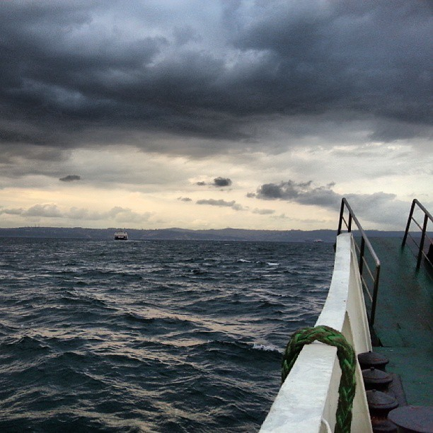 Marmara Denizi'nde bir vapurdan geçilmiş bir görüntü.